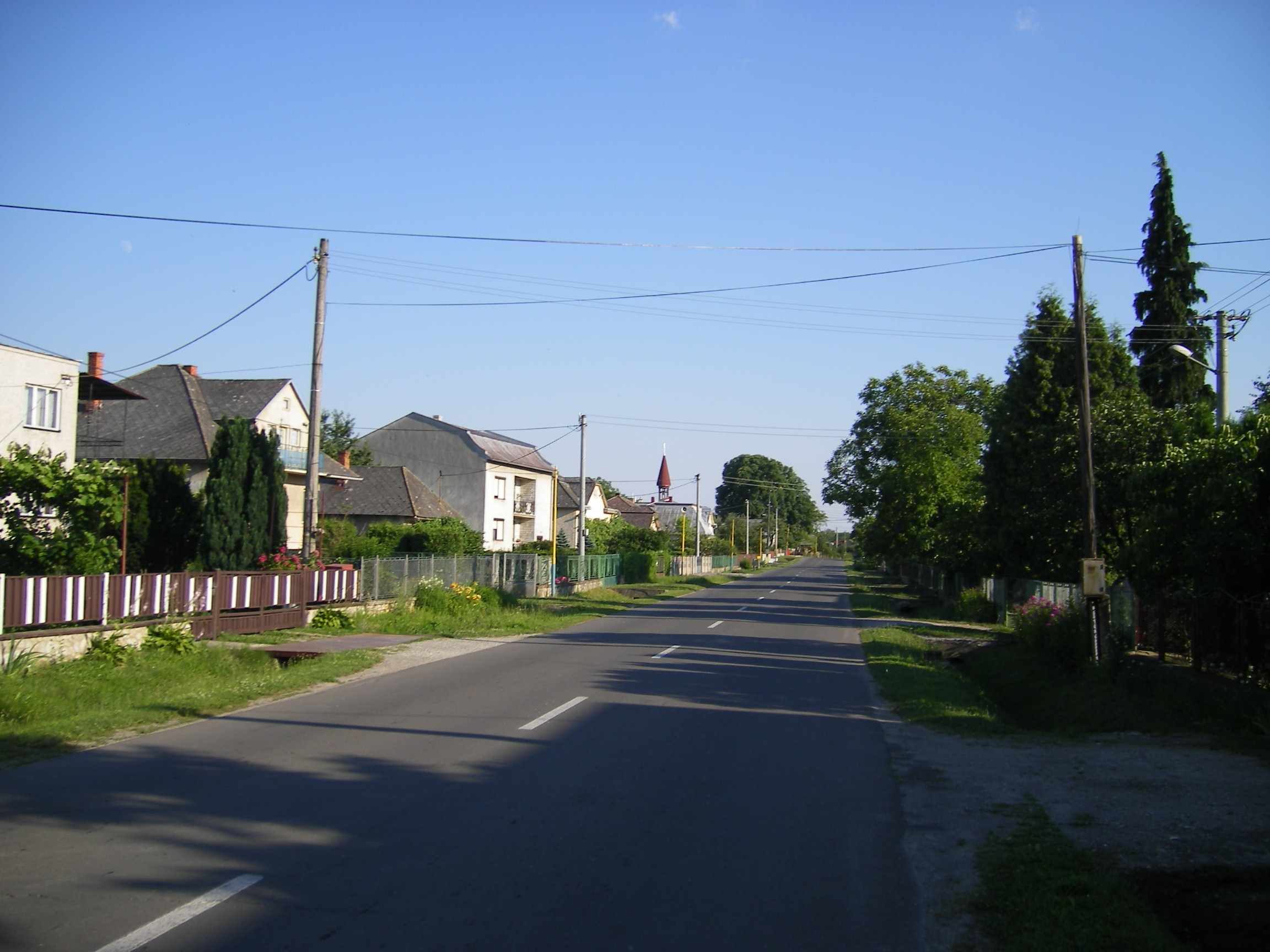 Nižný Hrabovec (okres Vranov nad Topľou)